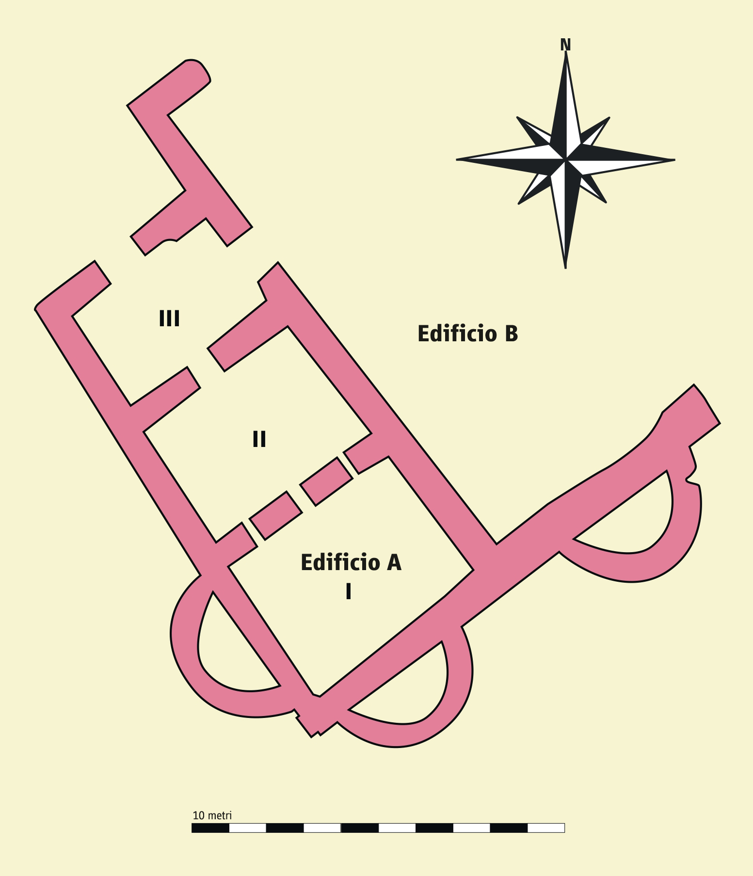 Pianta delle terme romane (IV/V secolo) scavate nel 1953-1954. Fonte: Kandler/Vetters: Der römisches Limes in Österreich, 1989